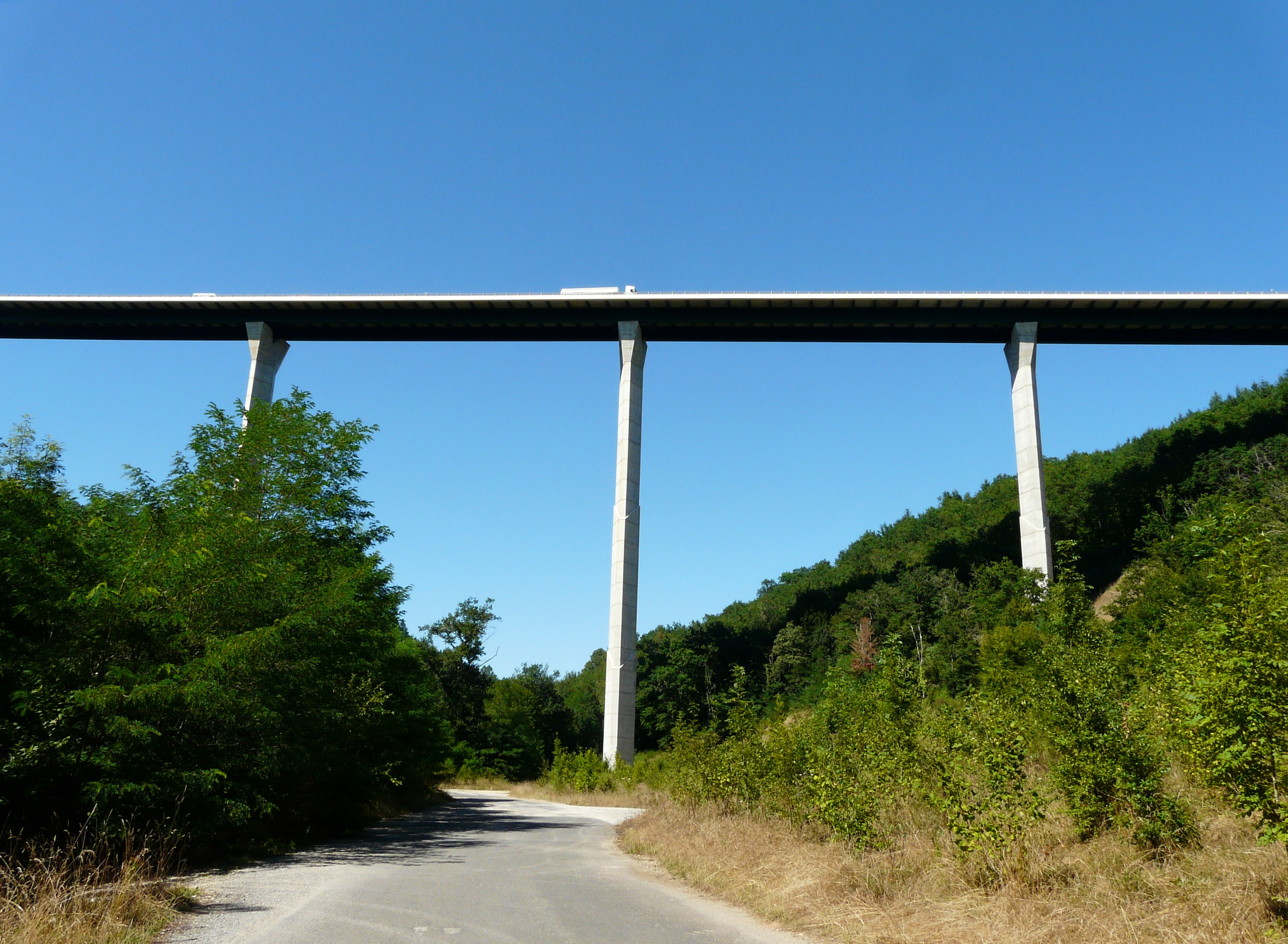 Le viaduc de l'Elle, Villac, Dordogne, France.